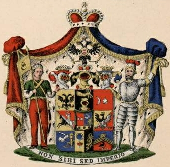 Zubovi suguvõsa vürstivapp